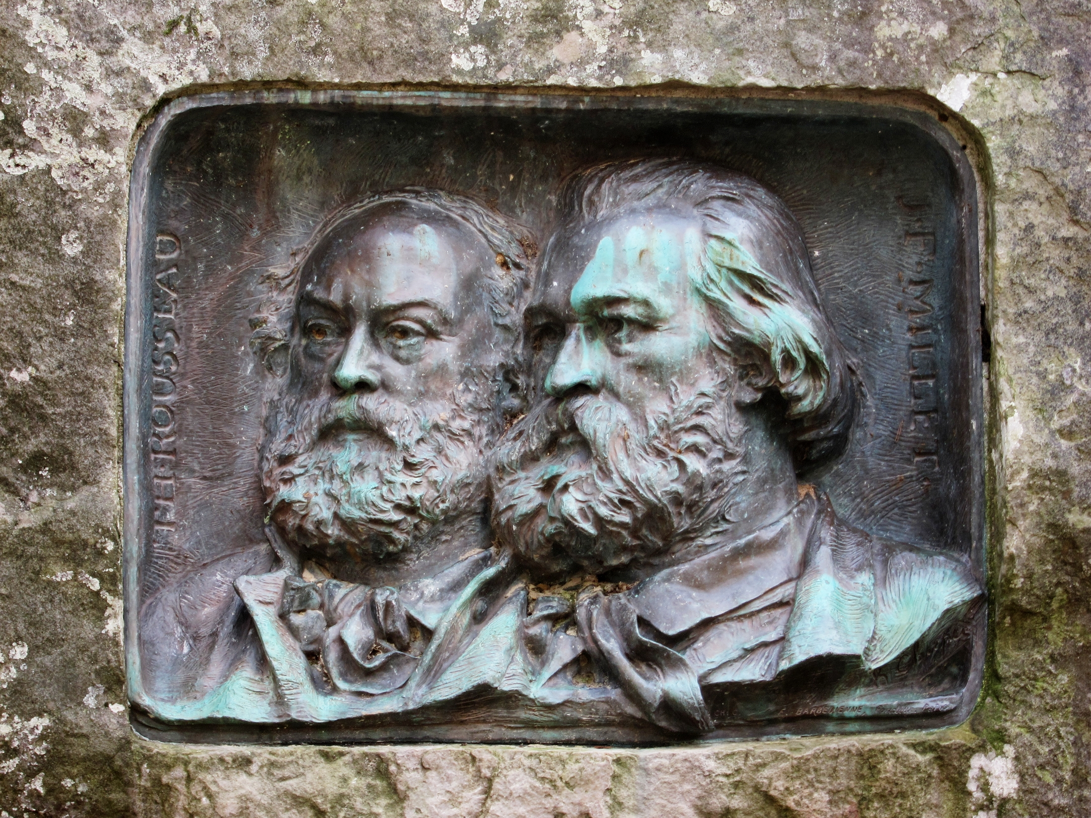 Bustes de Théodore Rousseau et de Jean-François Millet à Barbizon.